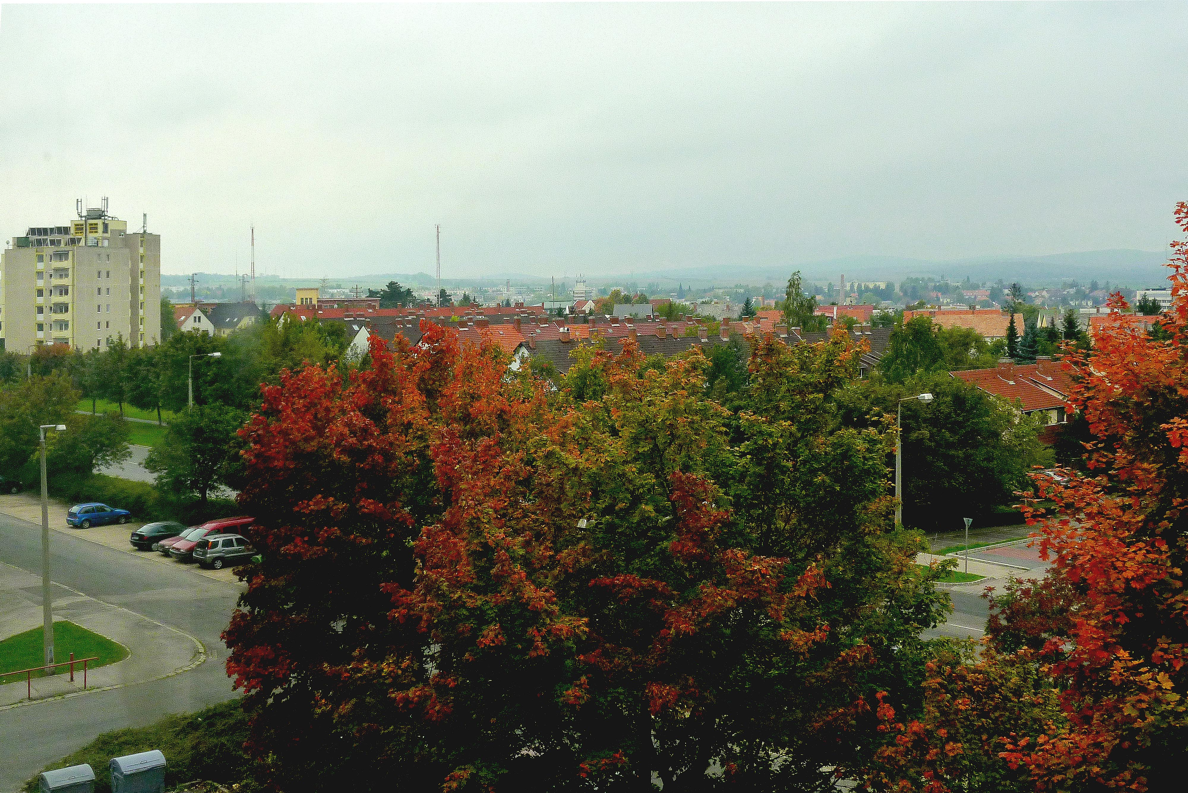 Veszprém, Cholnoky-város IV., zöldbeágyazott, társasházas kertváros